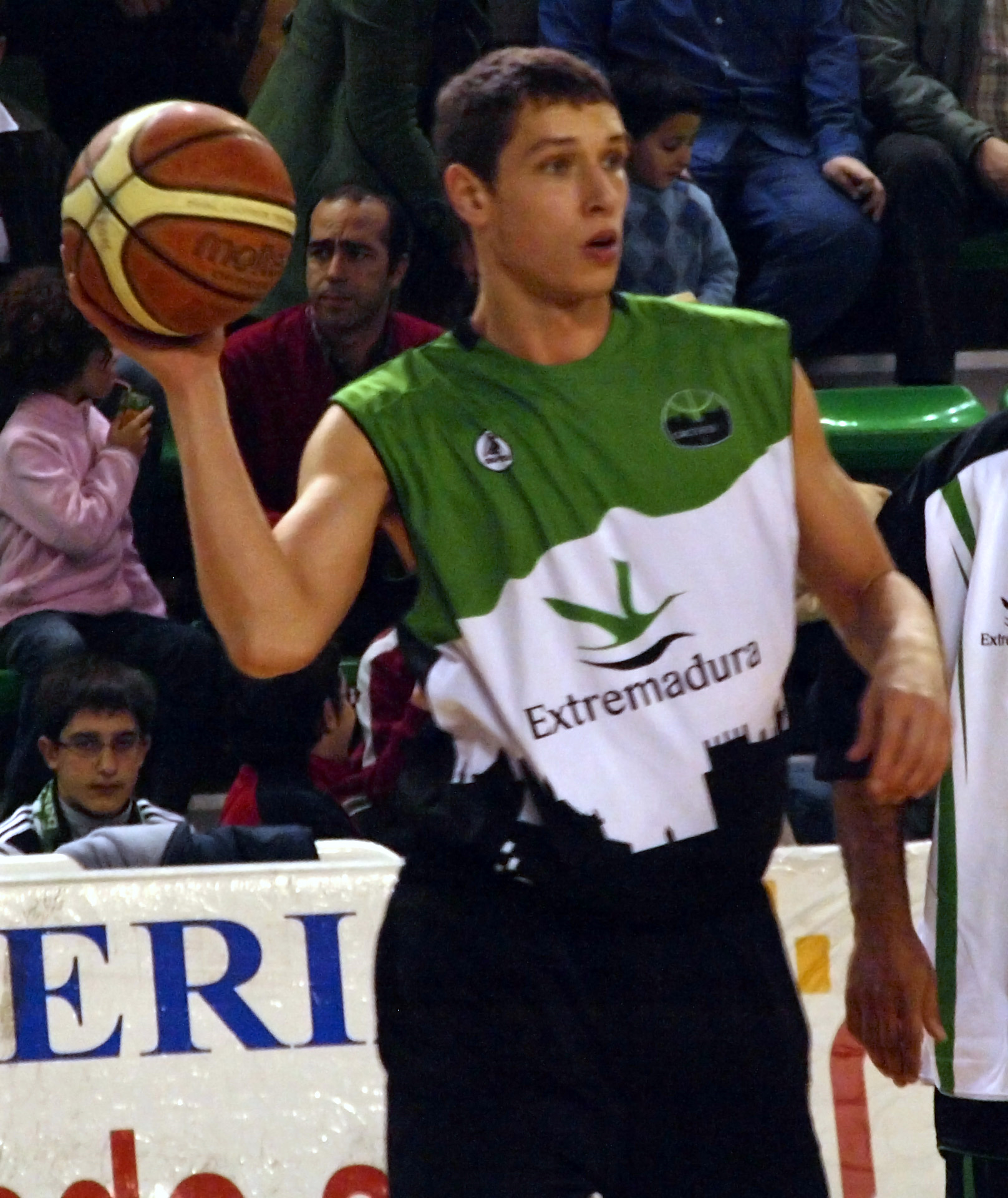 Pavel Ermolinski con la camiseta del Cáceres 2016 en el calentamiento previo al partido que el club extremeño disputó ante el UB La Palma de la temporada 2009/10 de la Adecco LEB Oro